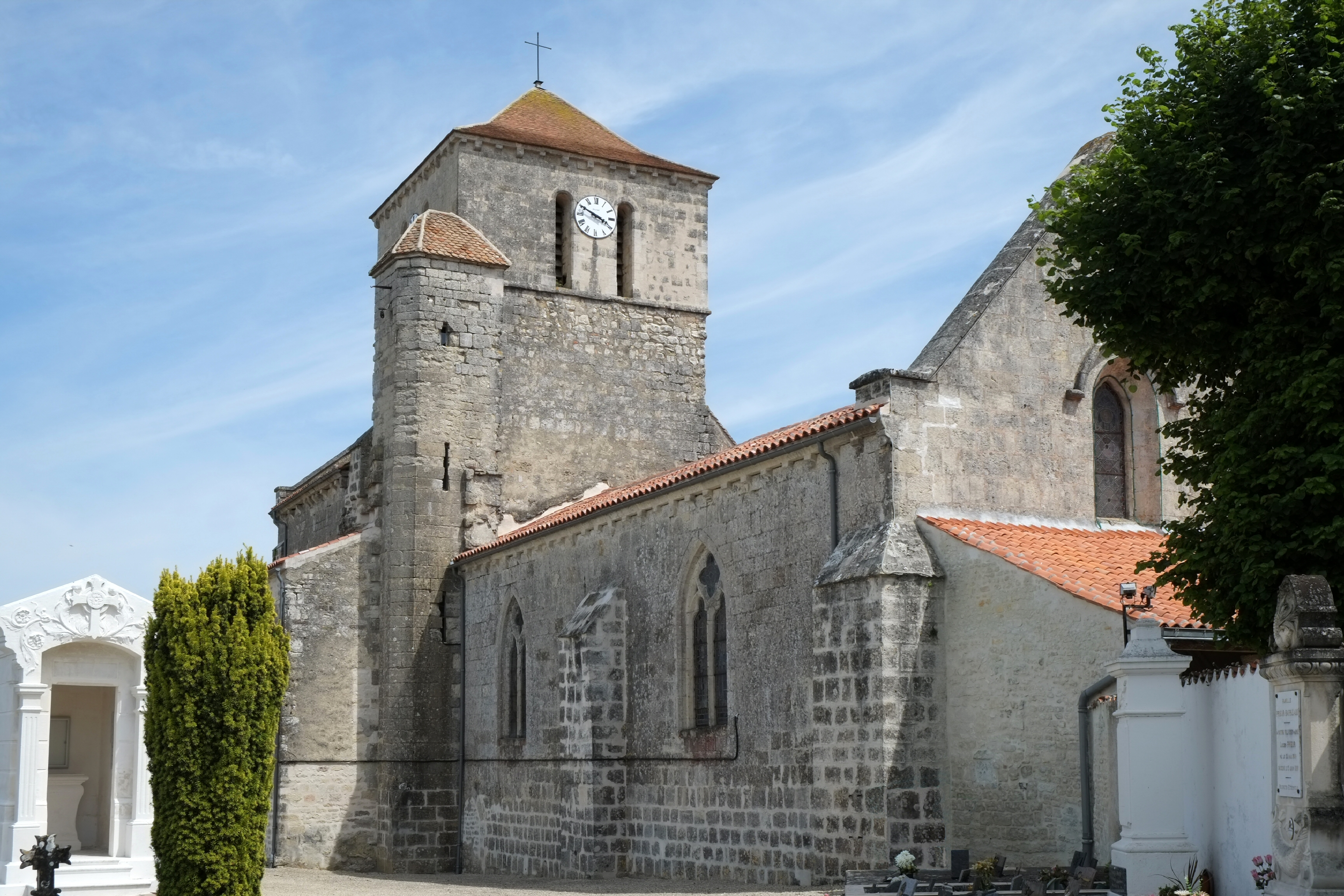 L'église Saint-Saturnin à Saint-Saturnin-du-Bois Charente-Maritime France .